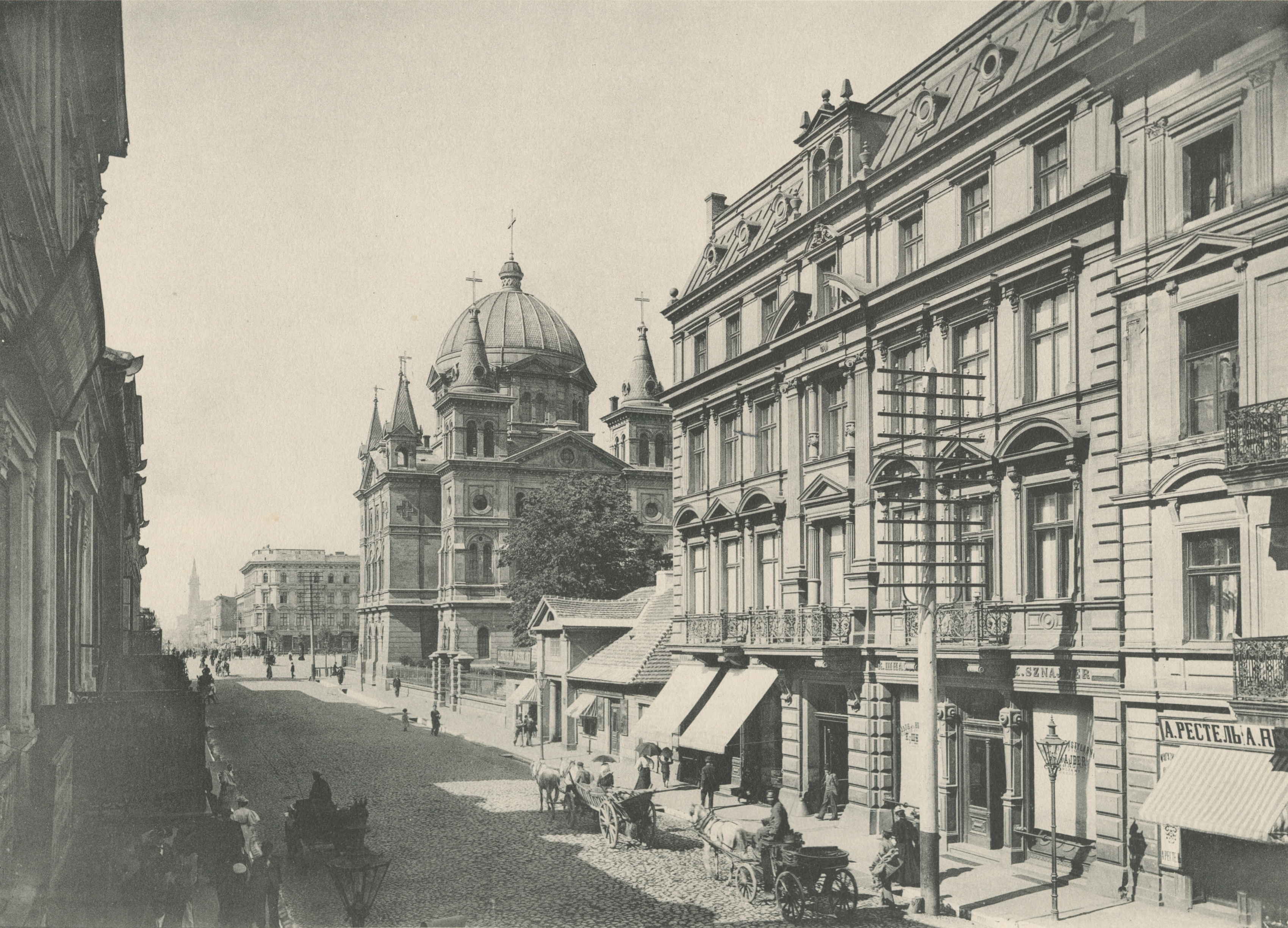 Fotografia, wykonana z okna jednej z kamienic, przedstawia widoku ulicy Piotrkowskiej w stronę Nowego Rynku (obecnie Plac Wolności). Widoczna na pierwszym planie kamienica pod numerem 6 została wybudowana w 1882 roku przez "Towarzystwo Akcyjne Zakładów Żyrardowskich Hielle i Dittrich". Na parterze funkcjonował skład fabryczny Zakładów Żyrardowskich, w którym sprzedawano bieliznę: damską, męską i pościelową. Kamienica Hiellego i Dittricha była komfortowo wyposażona. W mieszkaniach znajdowały się ubikacje i łazienki z wannami. Za kamienicą widać kościół Świętej Trójcy (obecnie pw. Zesłania Ducha Świętego). Na najdalszym planie dostrzec można kamienicę znajdująca się przy Nowym Rynku (obecnie Plac Wolności) zwyczajowo zwaną przez łodzian "kamienicą pod lwem", z powodu wieńczącej fasadę figury lwa. Fotografia pochodzi z wydanego w 1896 roku albumu Bronisława Wilkoszewskiego „Widoki m. Łodzi”. Saryusz Bronisław Paweł Wilkoszewski (1847-1901), zwany "łódzkim Canaletto" był mistrzem fotografii ilustracyjnej. Udokumentował zabudowę Łodzi z końca XIX wieku przede wszystkim wille, fabryki, budynki użyteczności publicznej, obiekty sakralne, ulicę Piotrkowską. Jego zakład fotograficzny znajdował się w willi "Trianon" w Pasażu Meyera 5 (obecnie ulica Moniuszki).